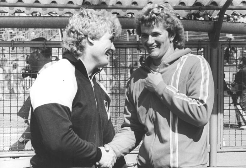 Gabi Reinsch, Ilke Wyludda im Gespräch ADN-ZB Thieme 12.6.88 Karl-Marx-Stadt: Leichtathletik-"Erzgebirgkristall"- Gabrielle Reinsch (r.) gewann das Diskuswerfen. Mit 73,42 M wurde sie viertbeste Diskuswerferin aller Zeiten. Im gleichen Wettbewerb verbesserte die Junioren-Europameisterin Ilke Wyludda (l.) ihren eigenen Junioren-Weltrekord um zehn Zentimeter auf 71,98 M.